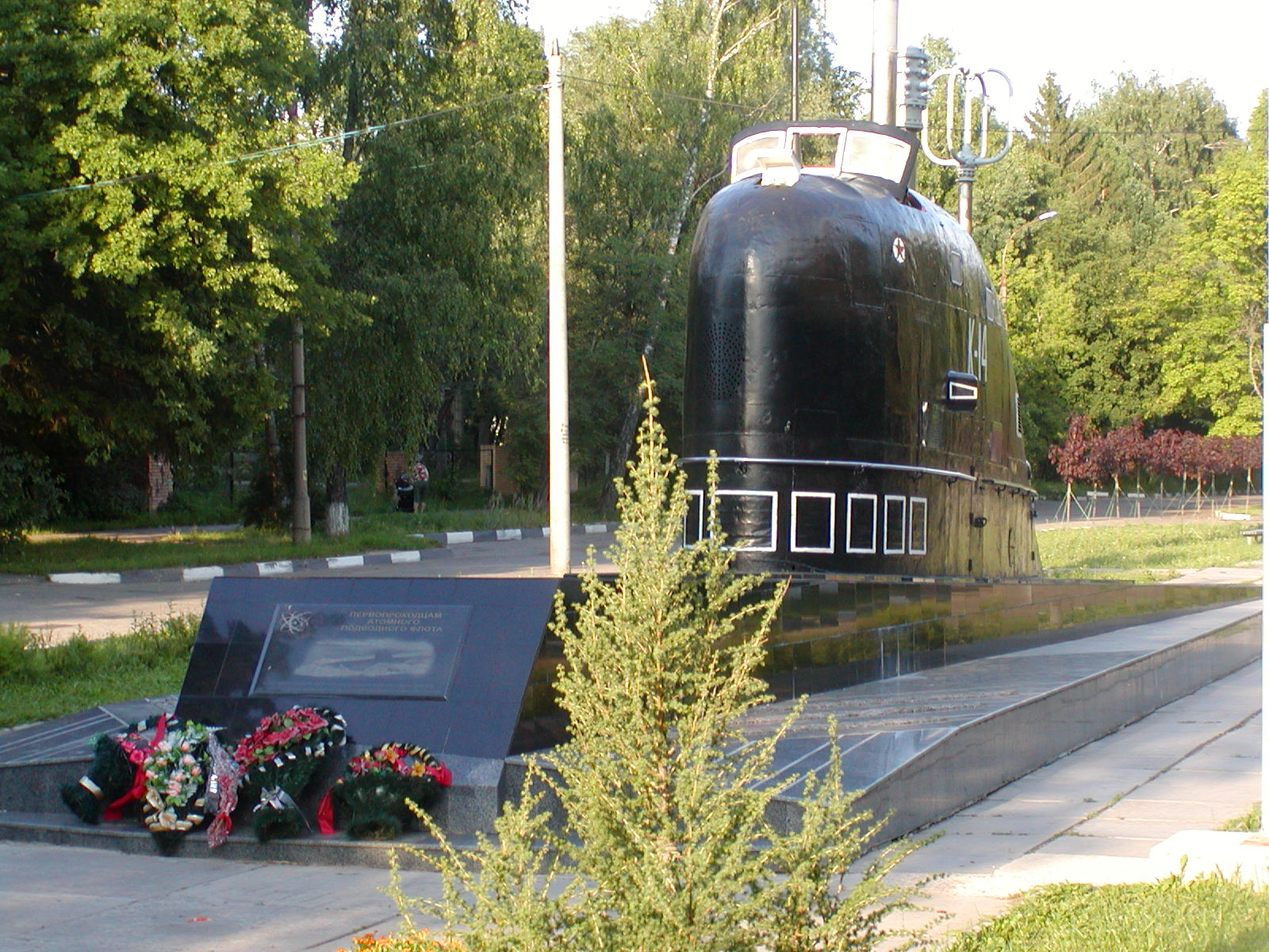 Памятник атомному подводному флоту в Обнинске.